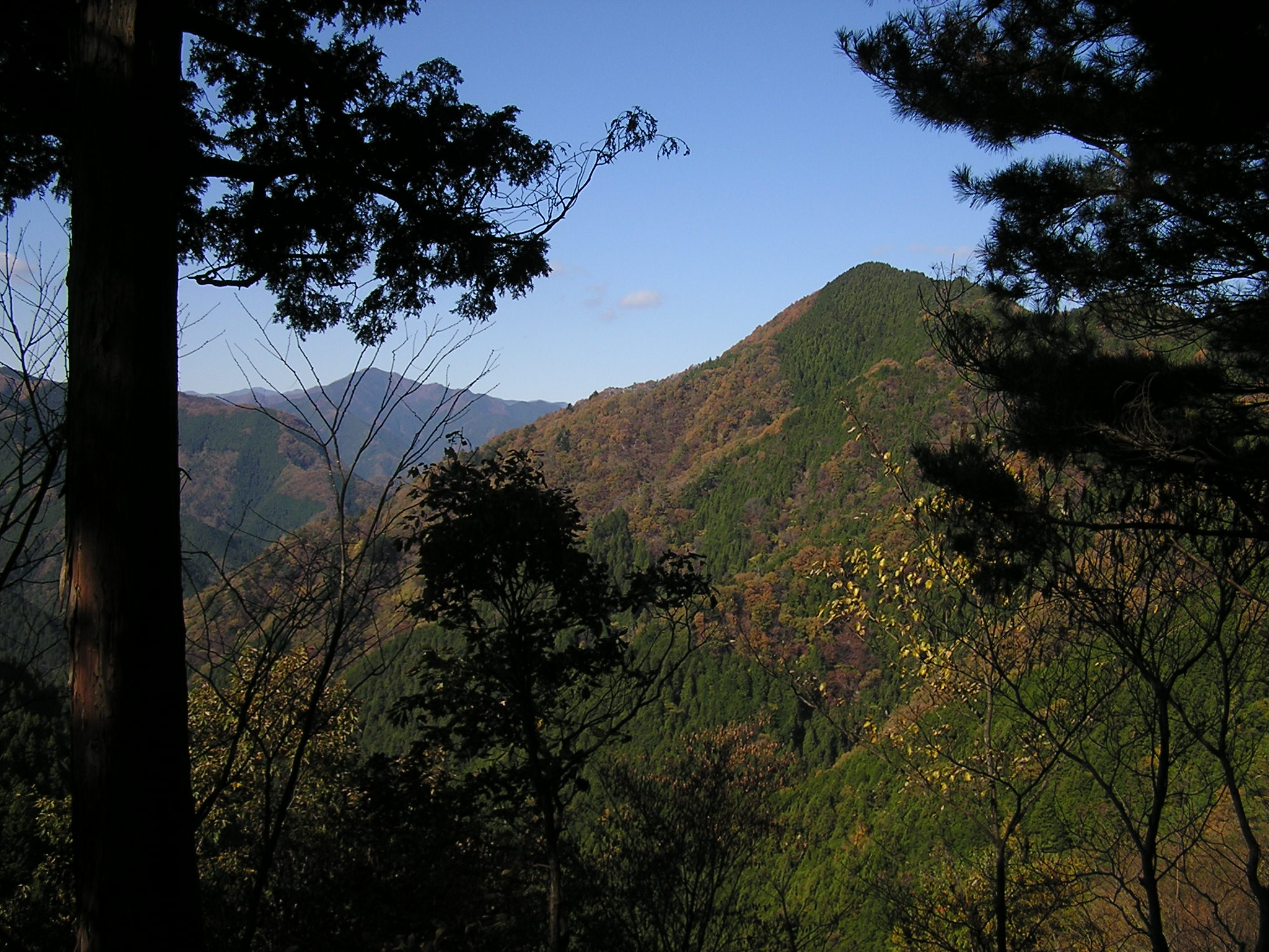 臼杵山（右）と御前山（左奥）